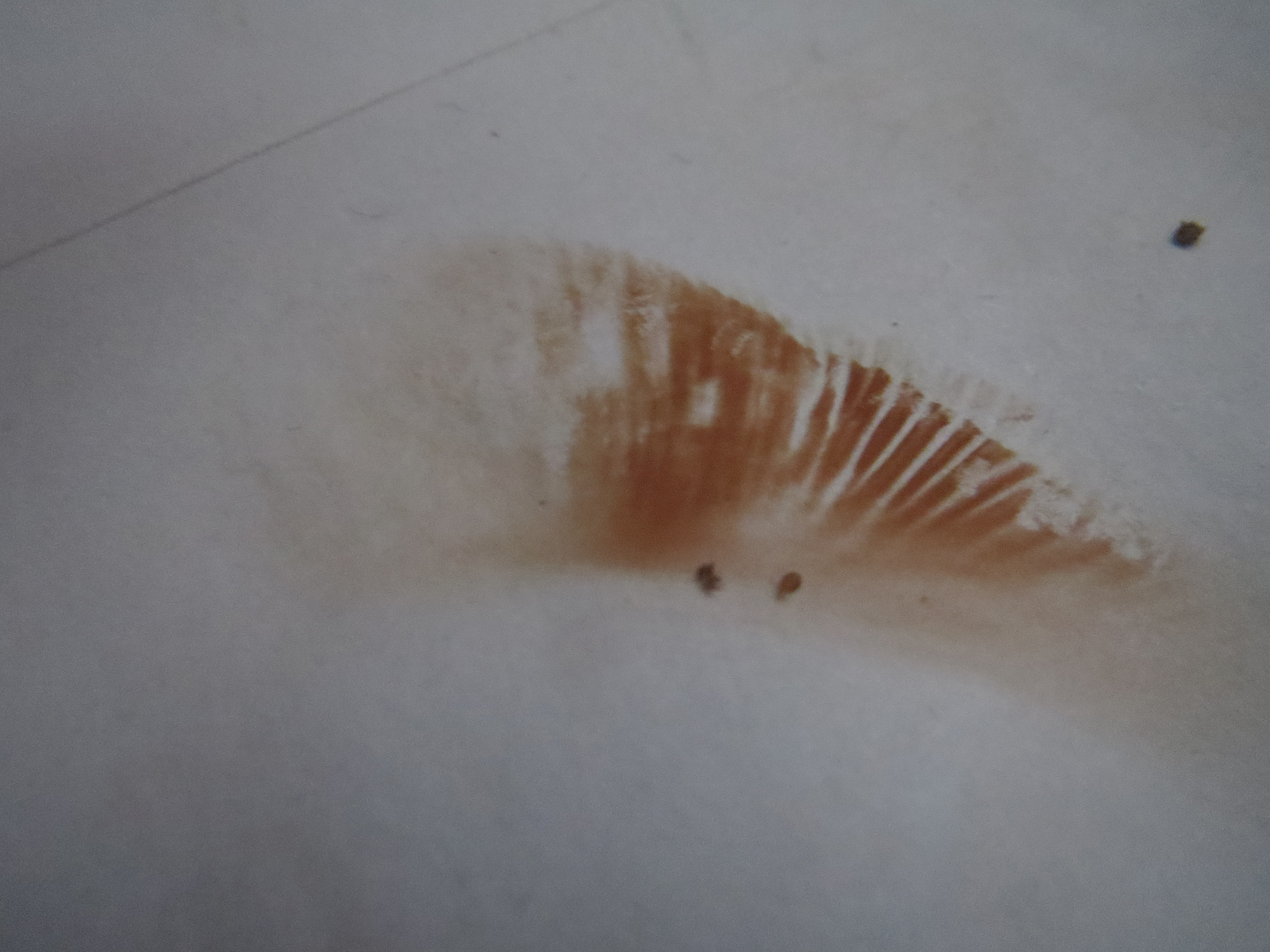 Kevätrusokkaan itiölaskeuma